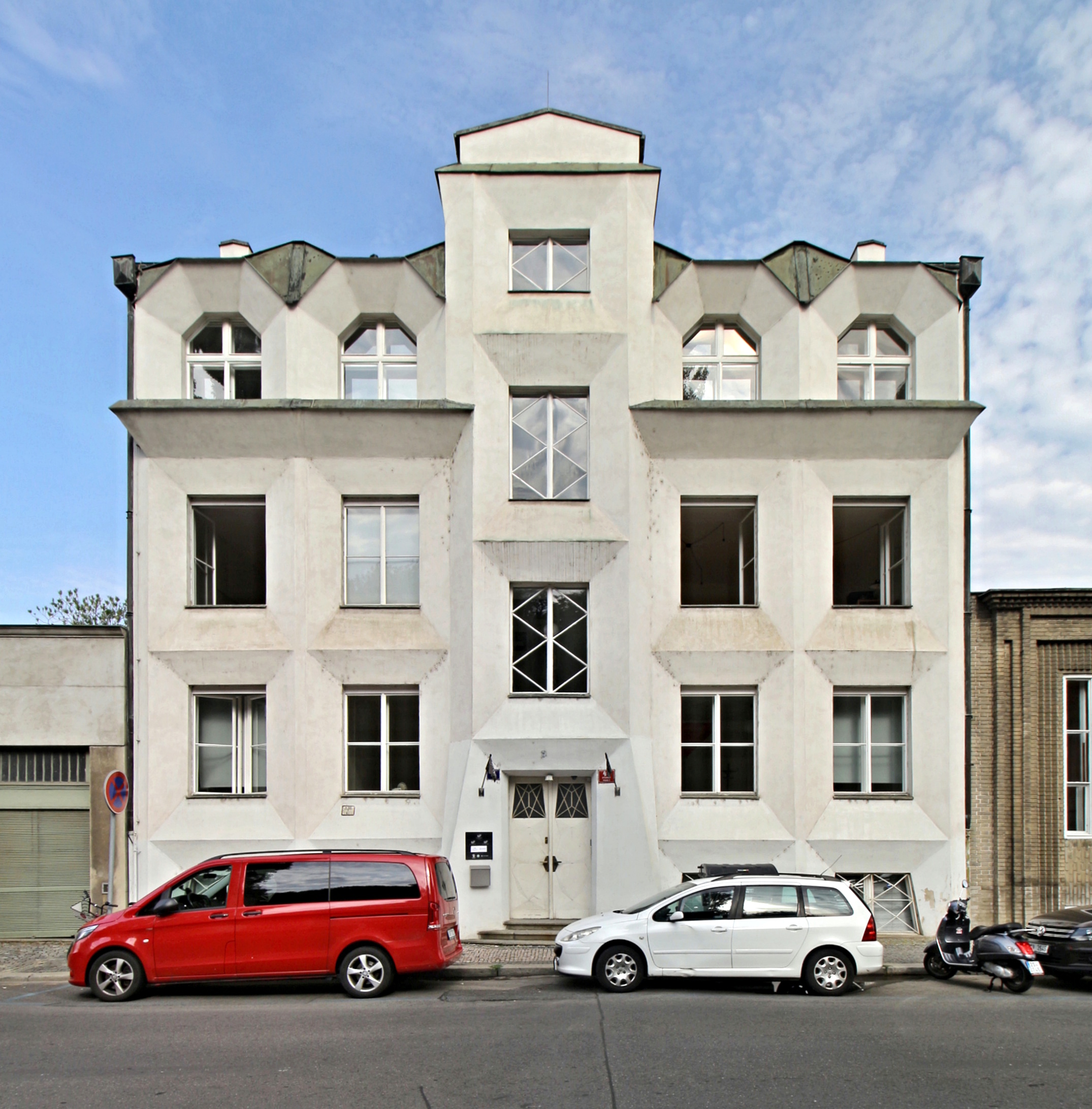 Vyšehradské vily Kovařovicova a Sequensova